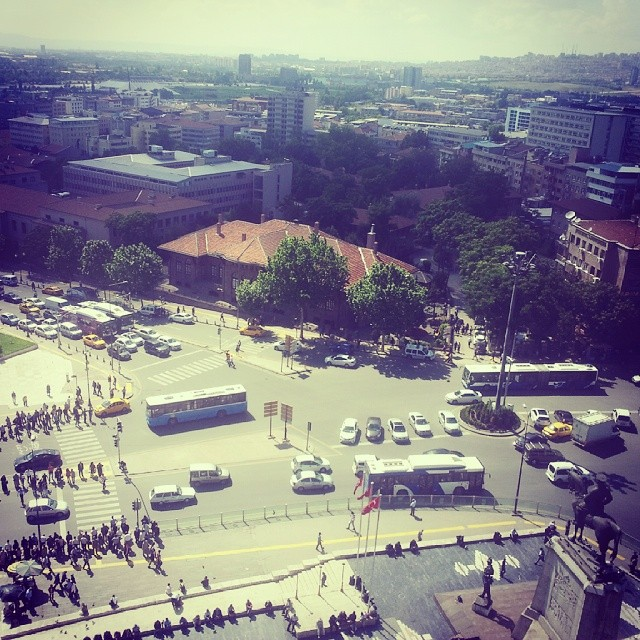 Kuş bakışı görünümüyle Ulus Meydanı (2013)